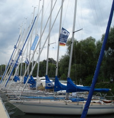 Aphrodite 101 im "Päckchen" während einer Klassenveranstaltung